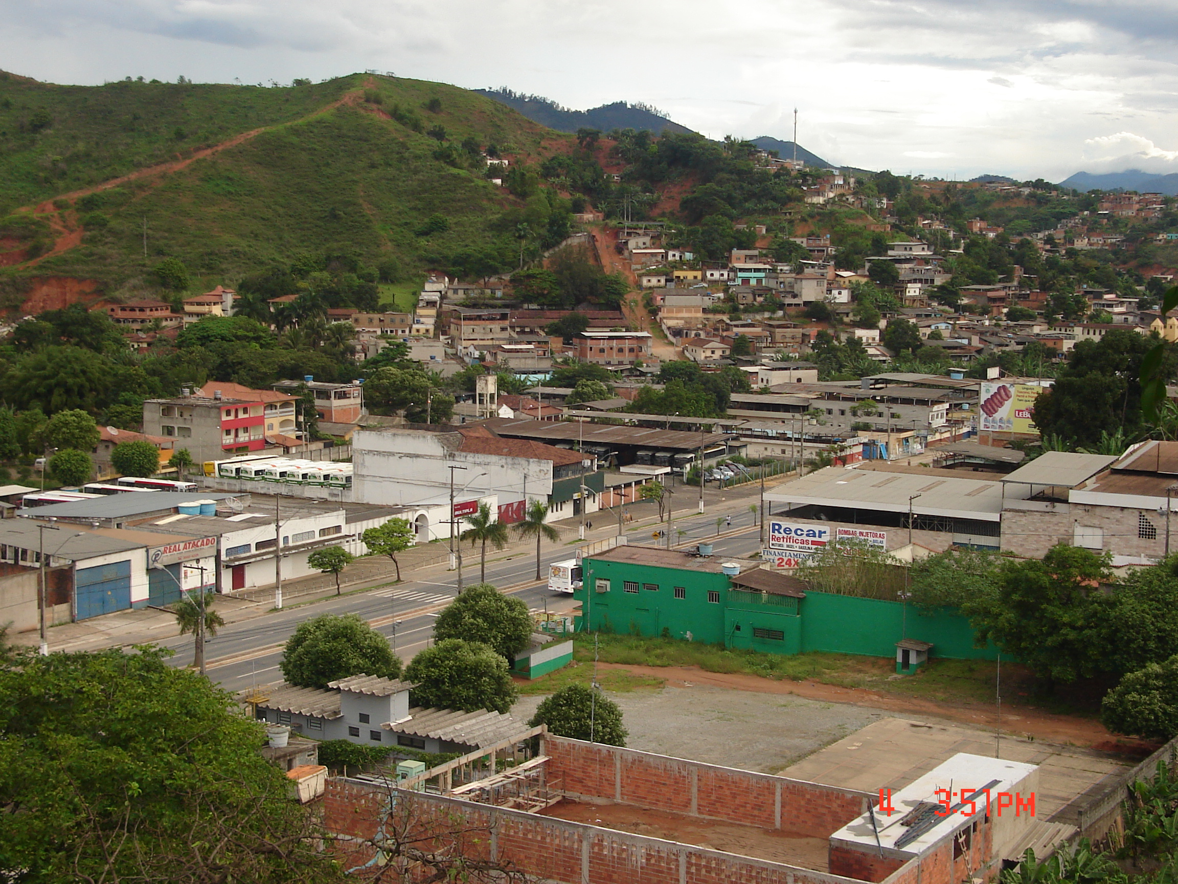 Caladinho de Cima, Coronel Fabriciano Mg